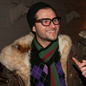 Ираклий Пирцхалава на дне рождения Маши Малиновской. 2010 год